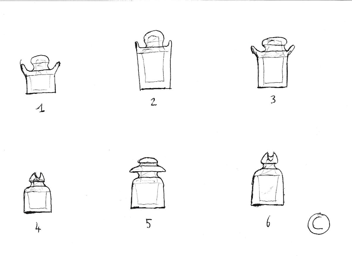 Croquis représentant les différents types d'isolateurs utilisés sur les réseaux aériens de télécommunication au cours du XXe siècle.